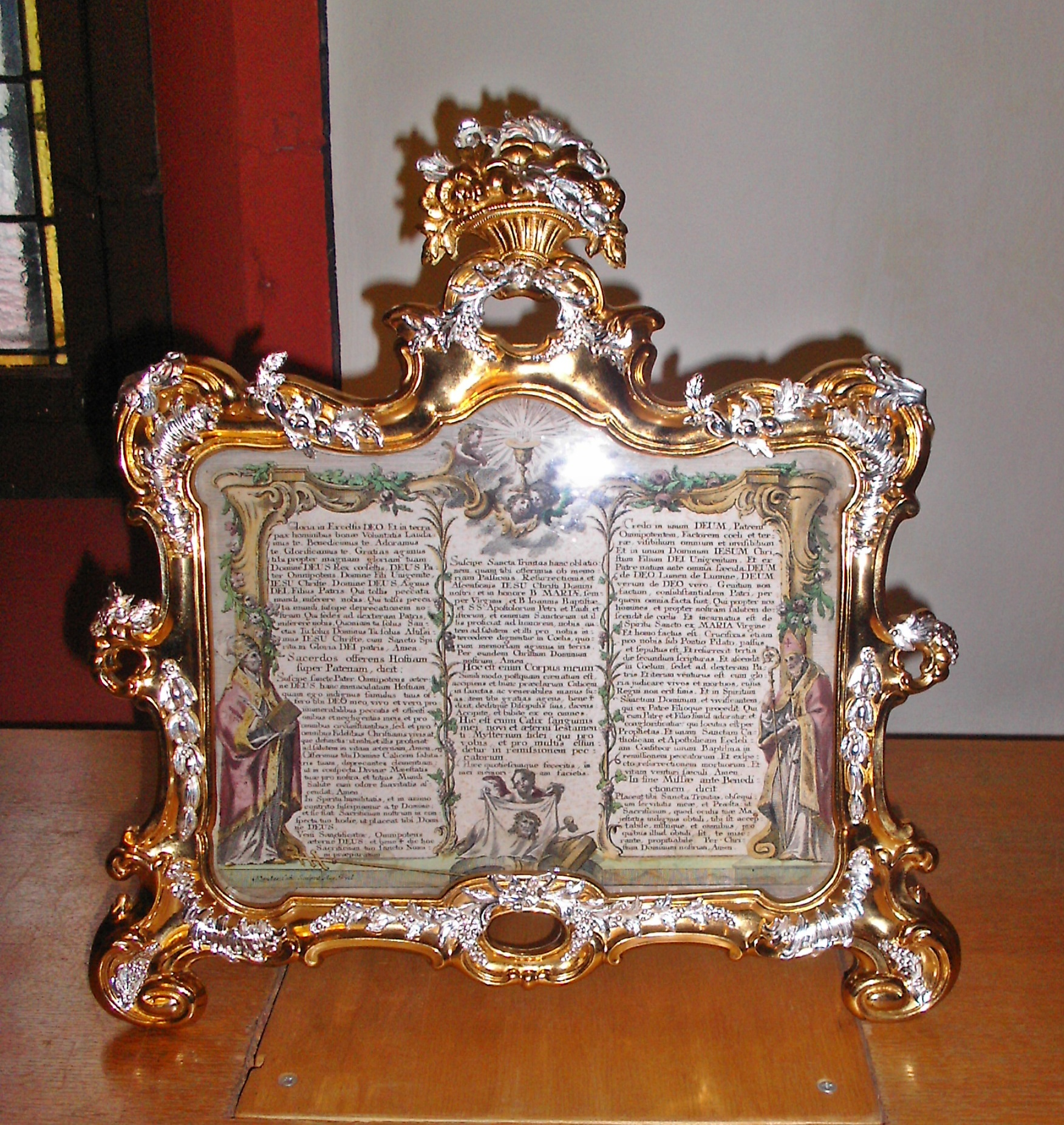 Barocke Kanontafel Stiftskirche Neustadt an der Weinstraße